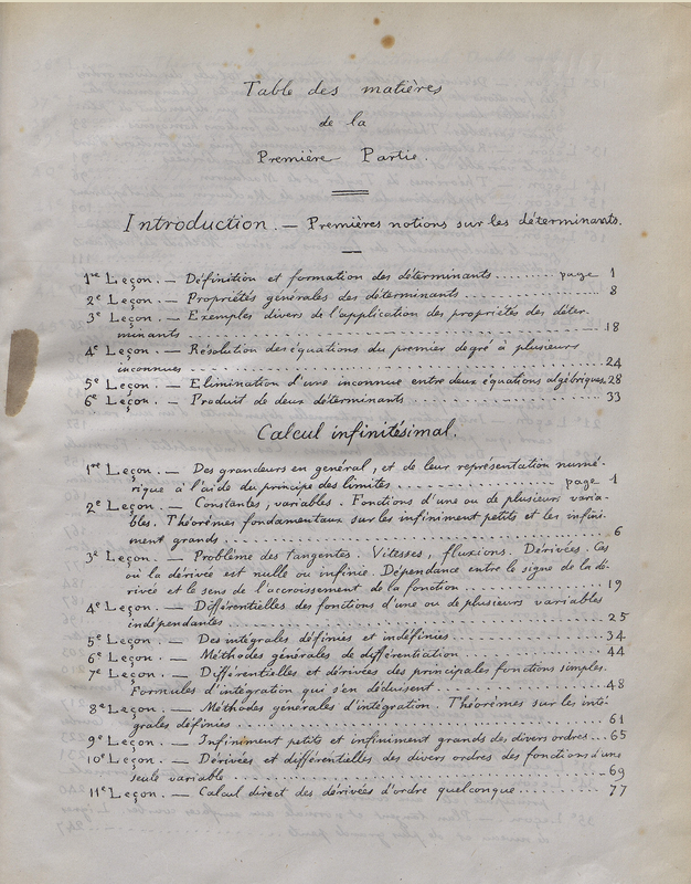 Cours de Calcul infinitésimal professé par Jules Houël à l'université de Bordeaux et publié à plusieurs reprises.